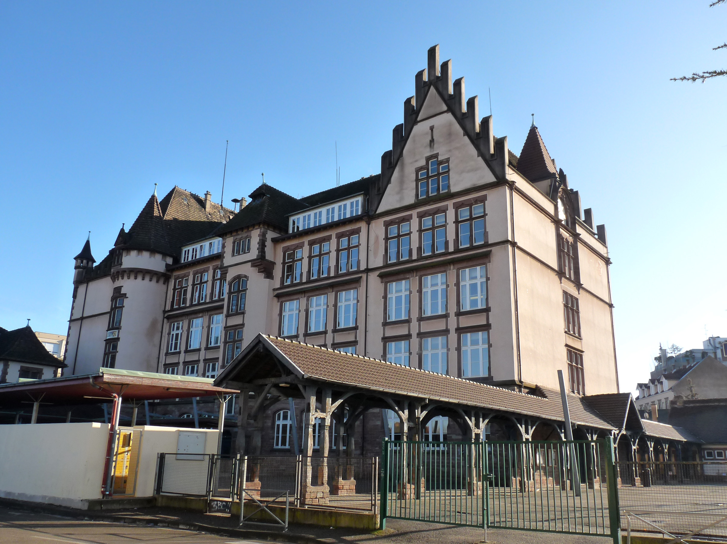 Collège de la Robertsau, côté rue du Petersgarten (Strasbourg)